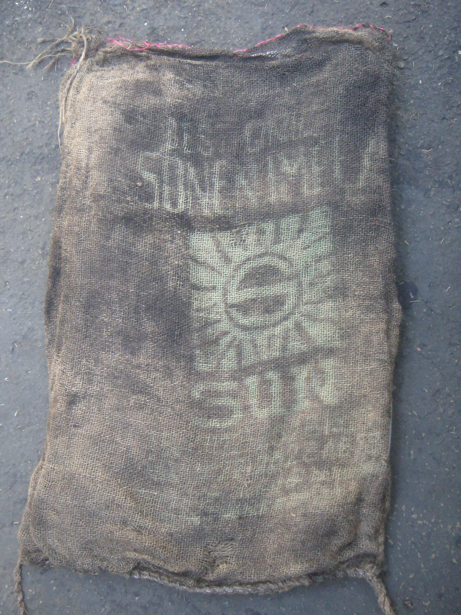 Goni